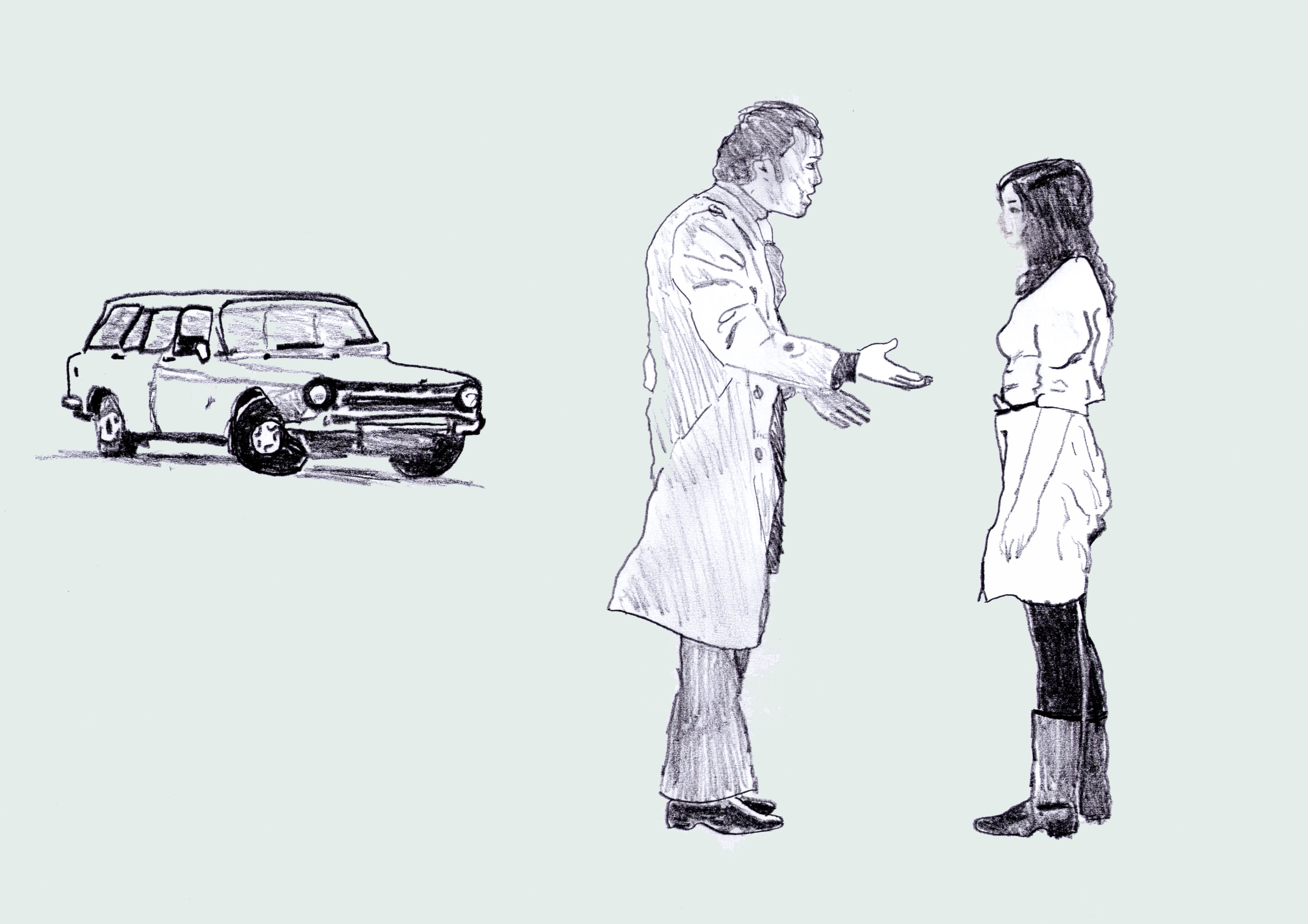 Interprétation au crayon d'une scène du film "Série Noire" d'Alain Corneau avec Patrick Dewaere et Marie Trintignant.